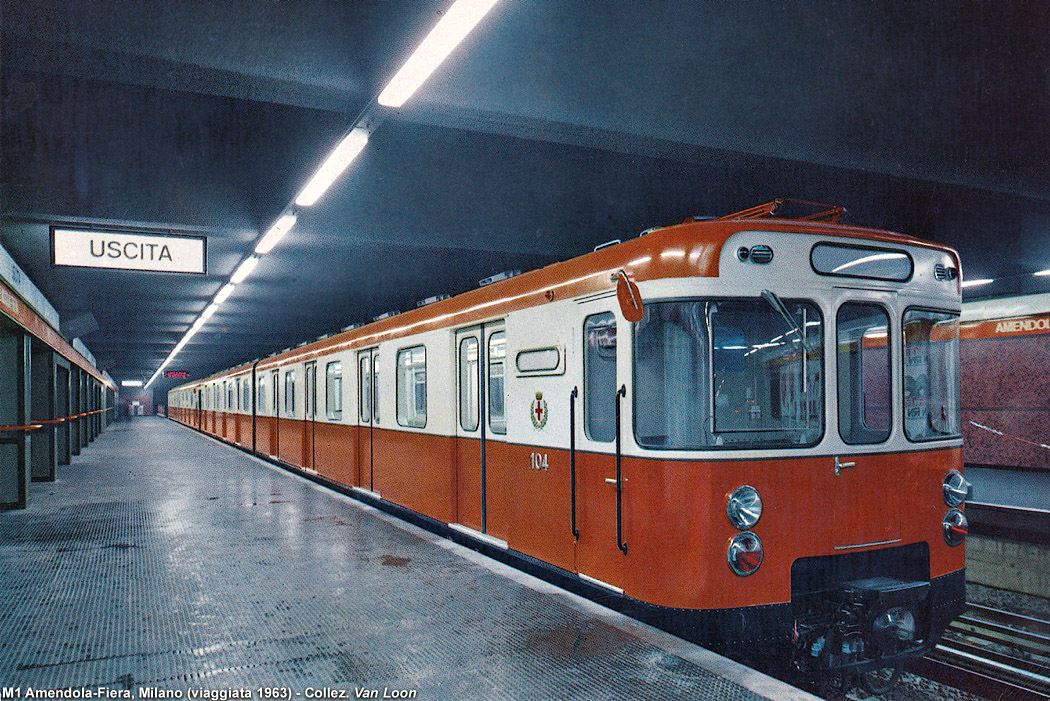 La stazione di Amendola-Fiera della metropolitana di Milano prima dell’attivazione (cartolina viaggiata nel 1963). È in sosta un treno composto di quattro motrici (in testa la n. 104).